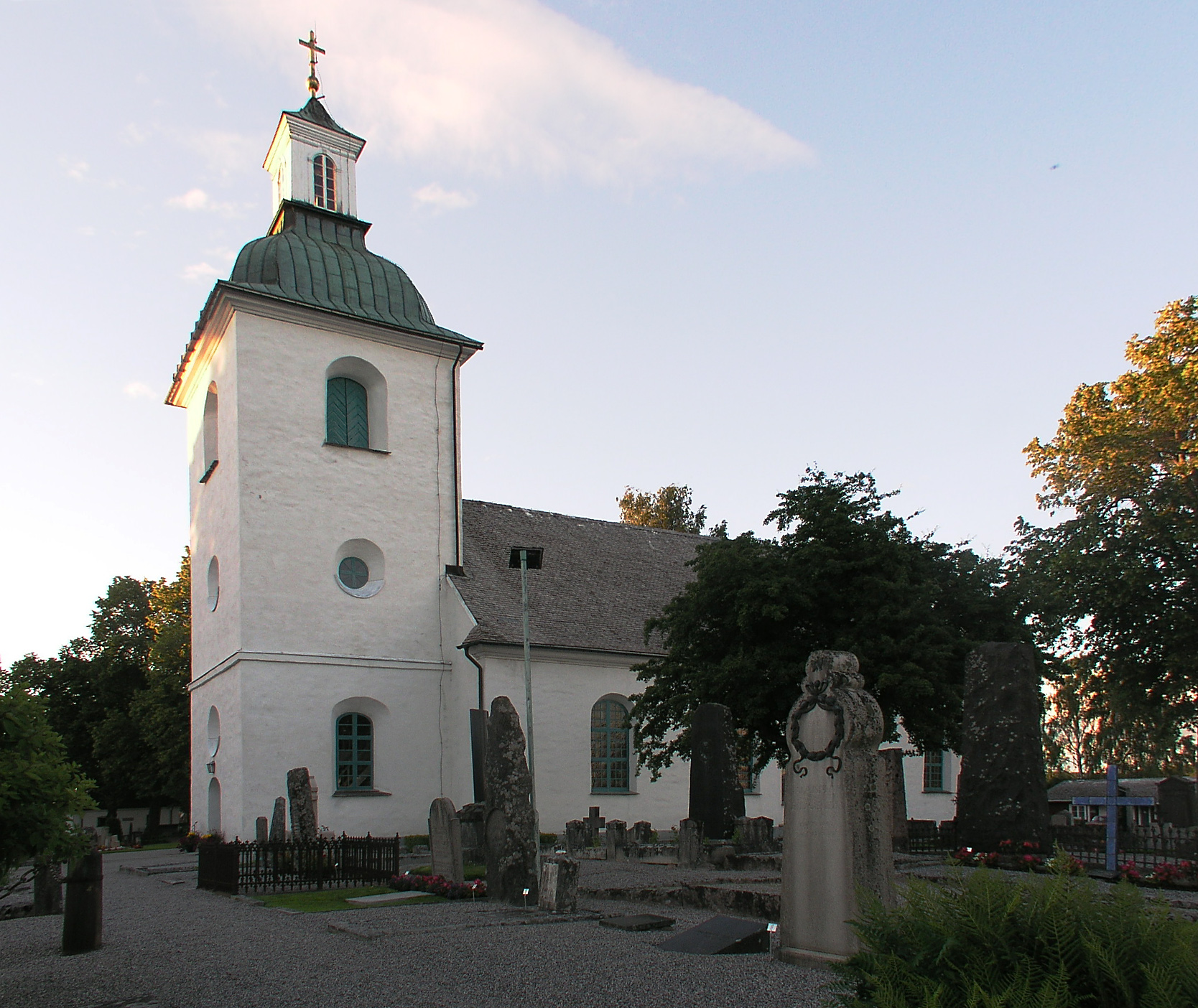 Mikaelikyrkan, Arvika, Diocese of Karlstad, Sweden